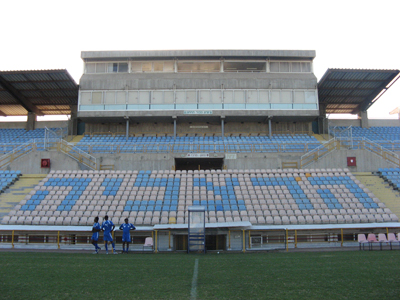 אצטדיון עירוני הרצליה